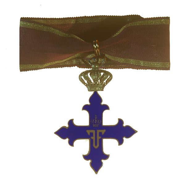 Kruis IIe Klasse aan lint 1916 - 1918